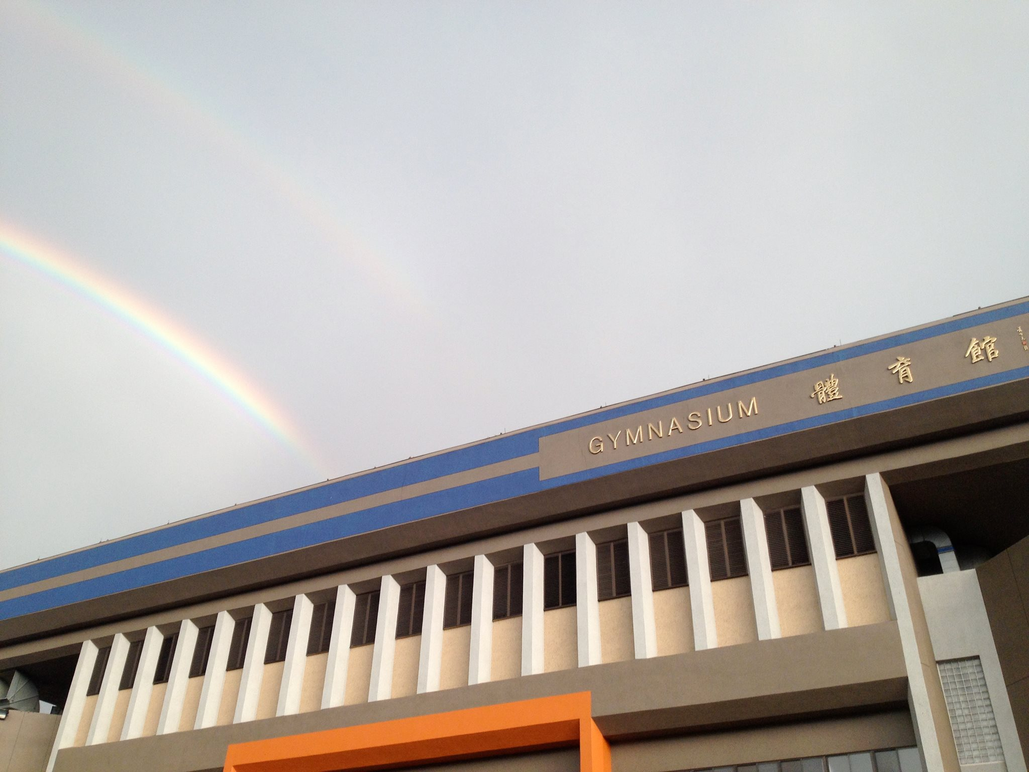 2010年雷斯盃賽事結束後 國立中興大學體育館